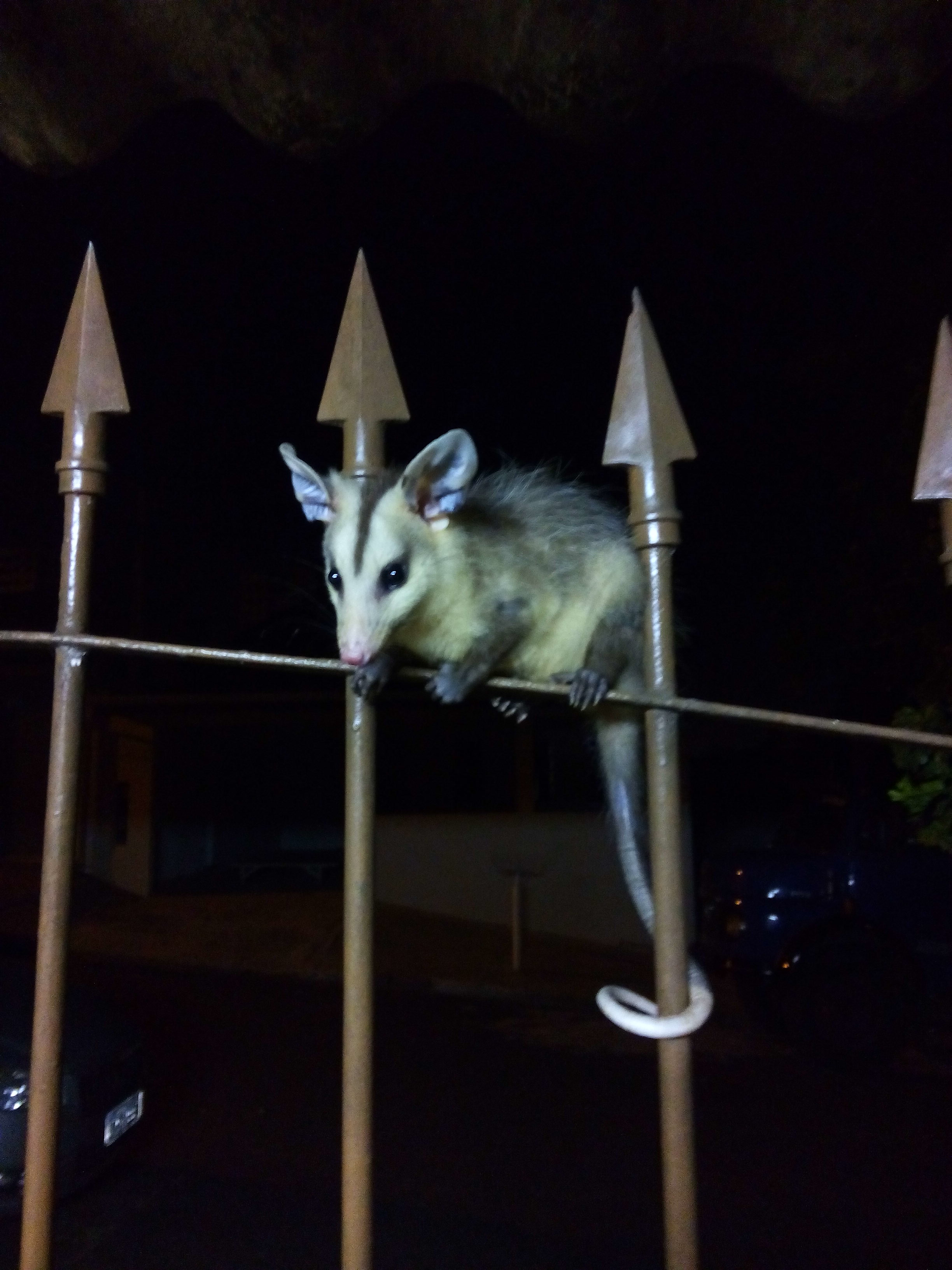 Animal tendo seu habitat natural restringido, entra nas casas e se arrisca com animais domésticos e o próprio ser humano por alimento, desde então deixamos periodicamente frutas no muro para eles... Estas frutas nunca foram perdidas... sempre comeram.